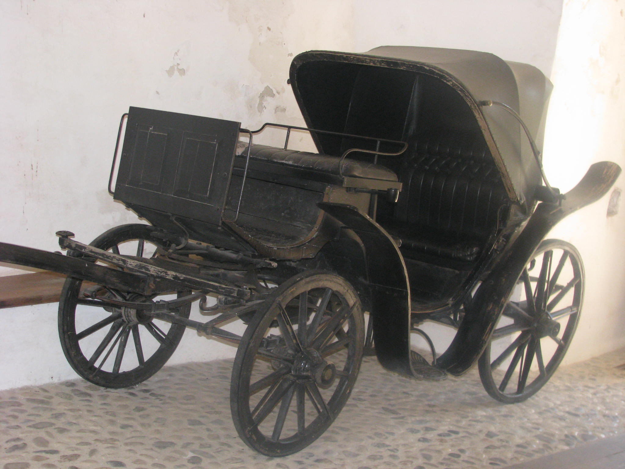 Castle Podstreda